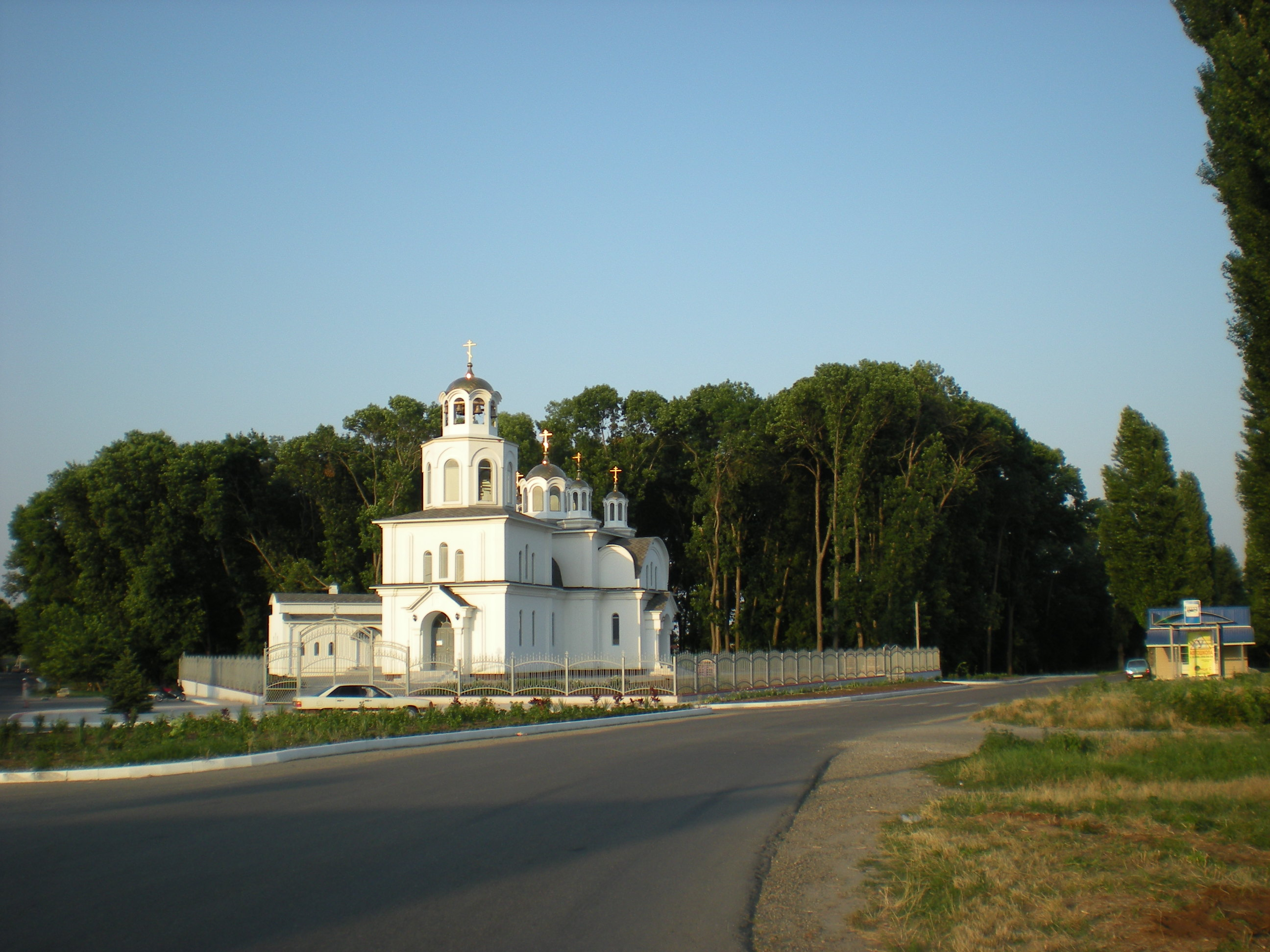 Korenovsk, Krasnodar Krai, Russia